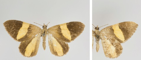 Hagnagora discordata